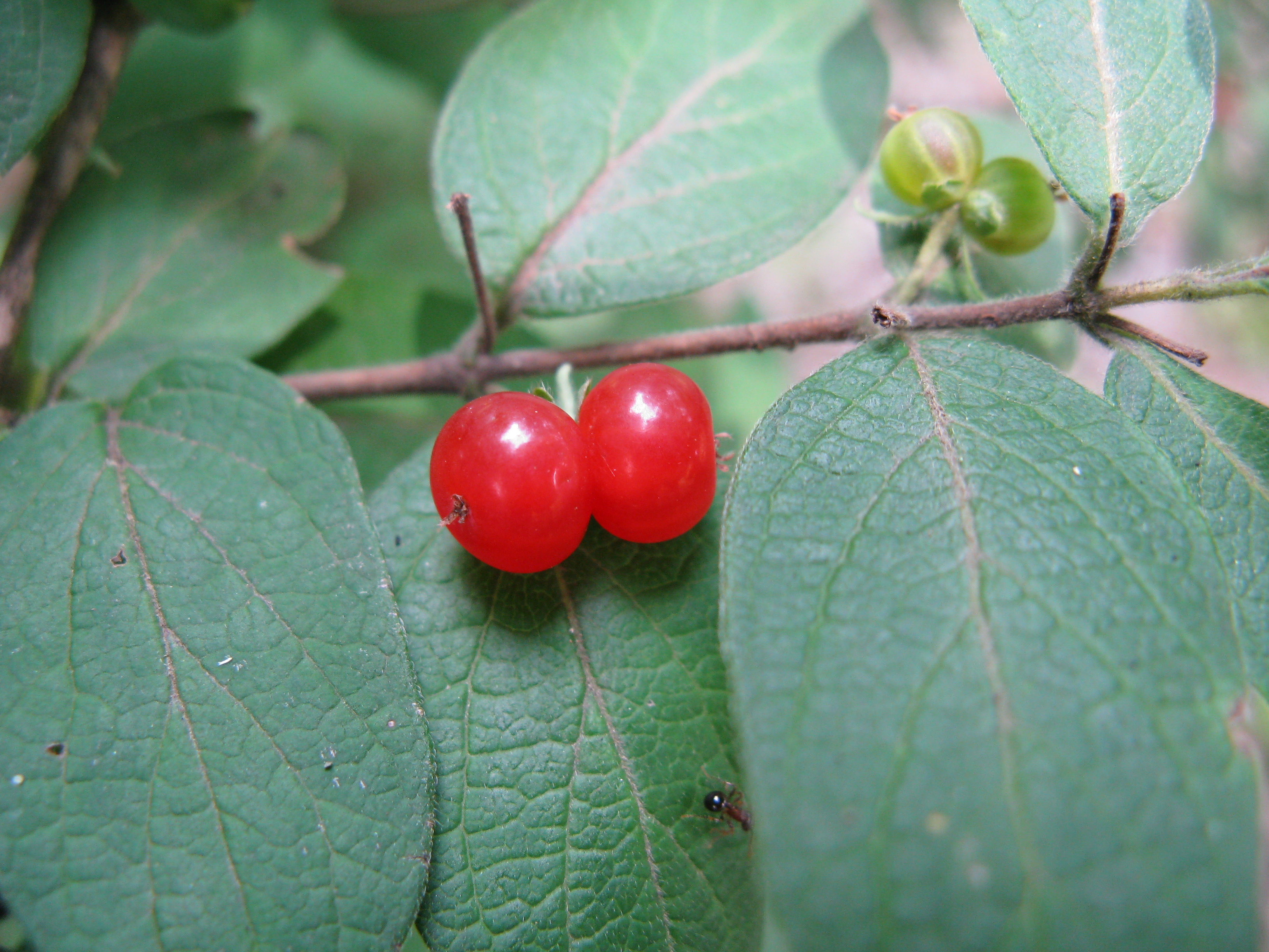 Scientific name Lonicera morrowii